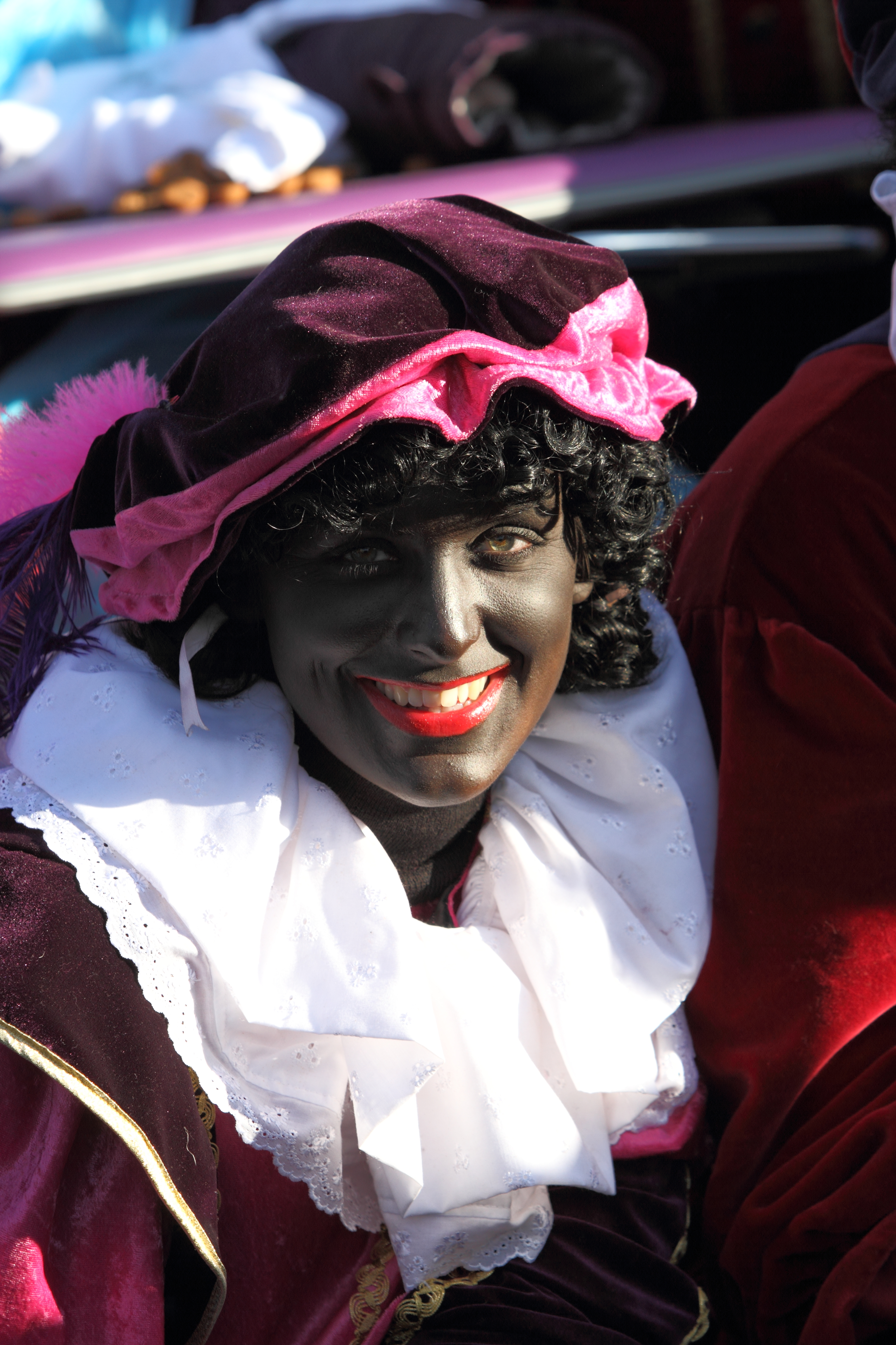 Intocht van Sinterklaas in Schiedam 2009